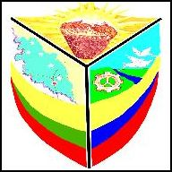 Escudo de Villa Rica